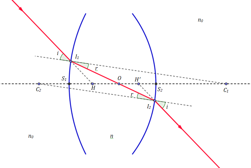 Position du centre optique dans le cas d'une lentille sphérique épaisse.